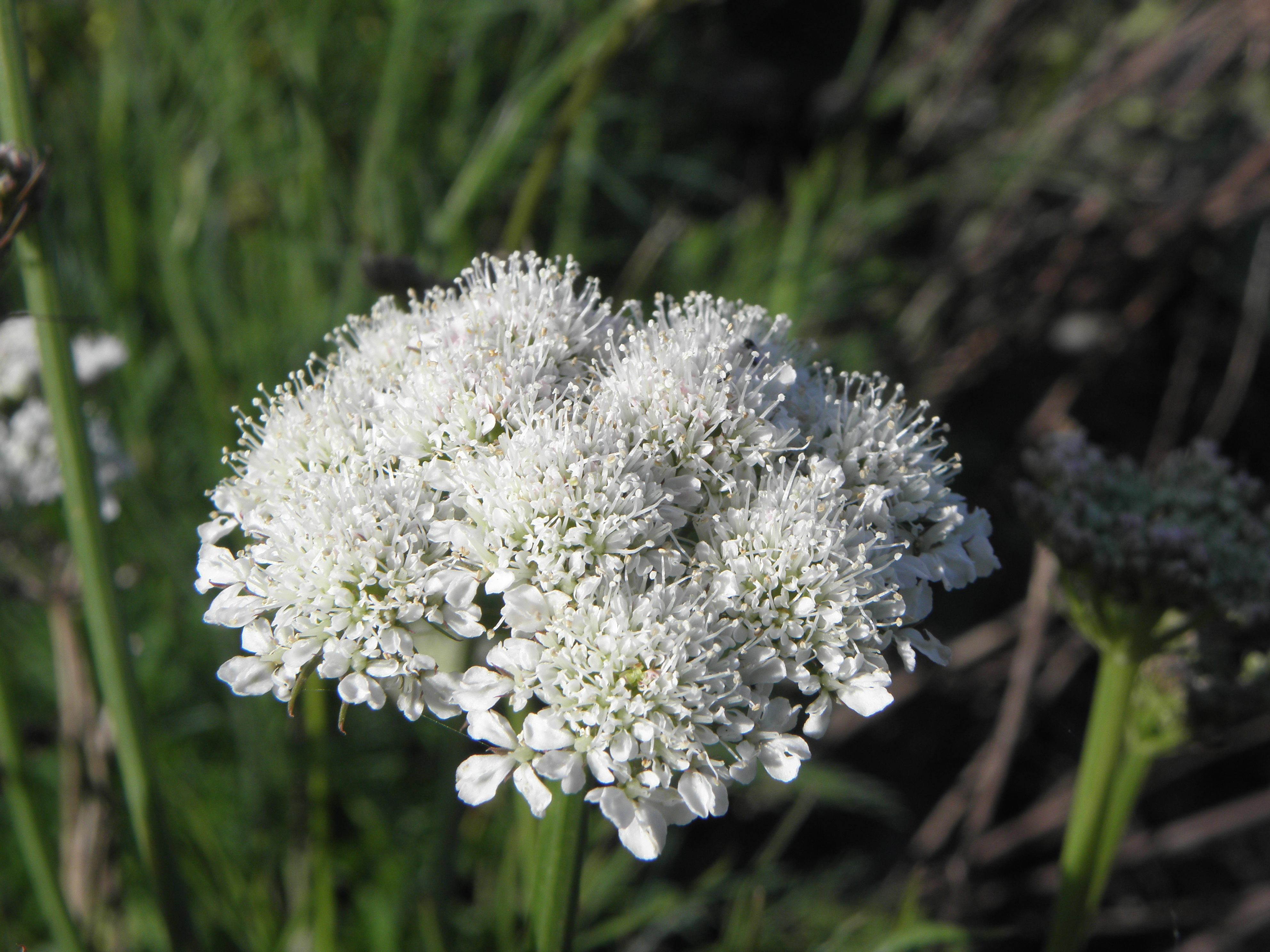 Bunium bulbocastanum